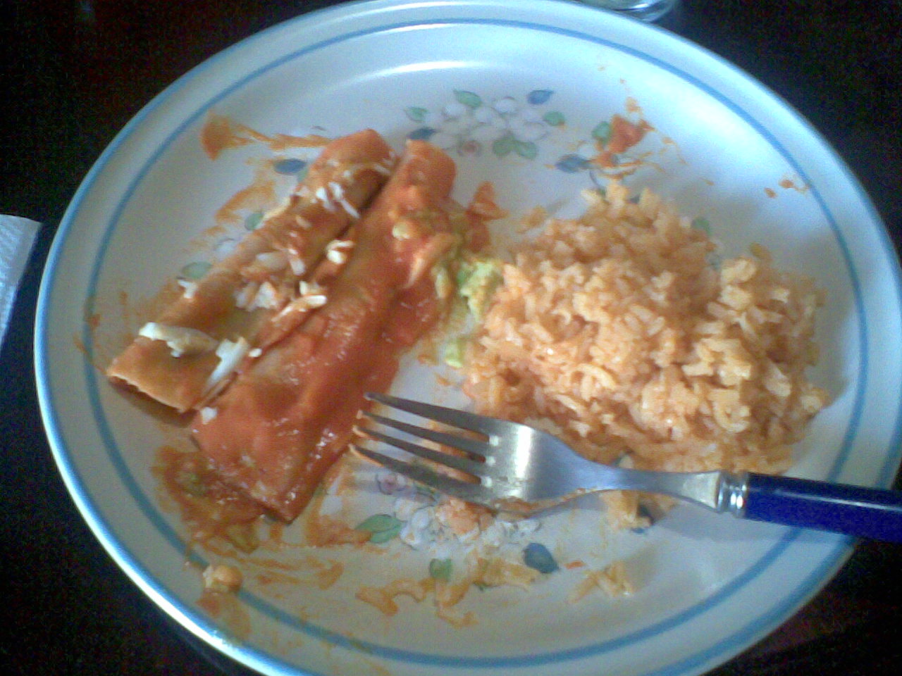 Entomatadas